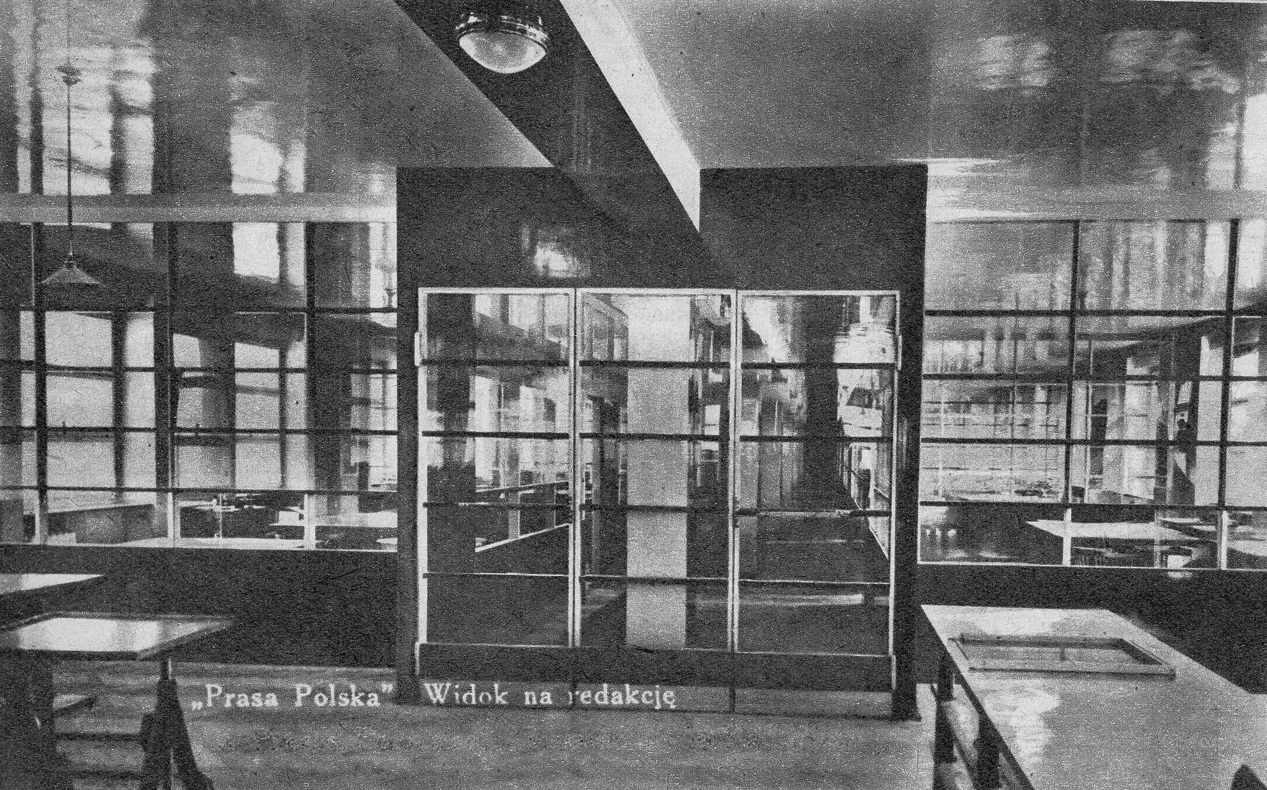 Wnętrze Domu Prasy w Warszawie